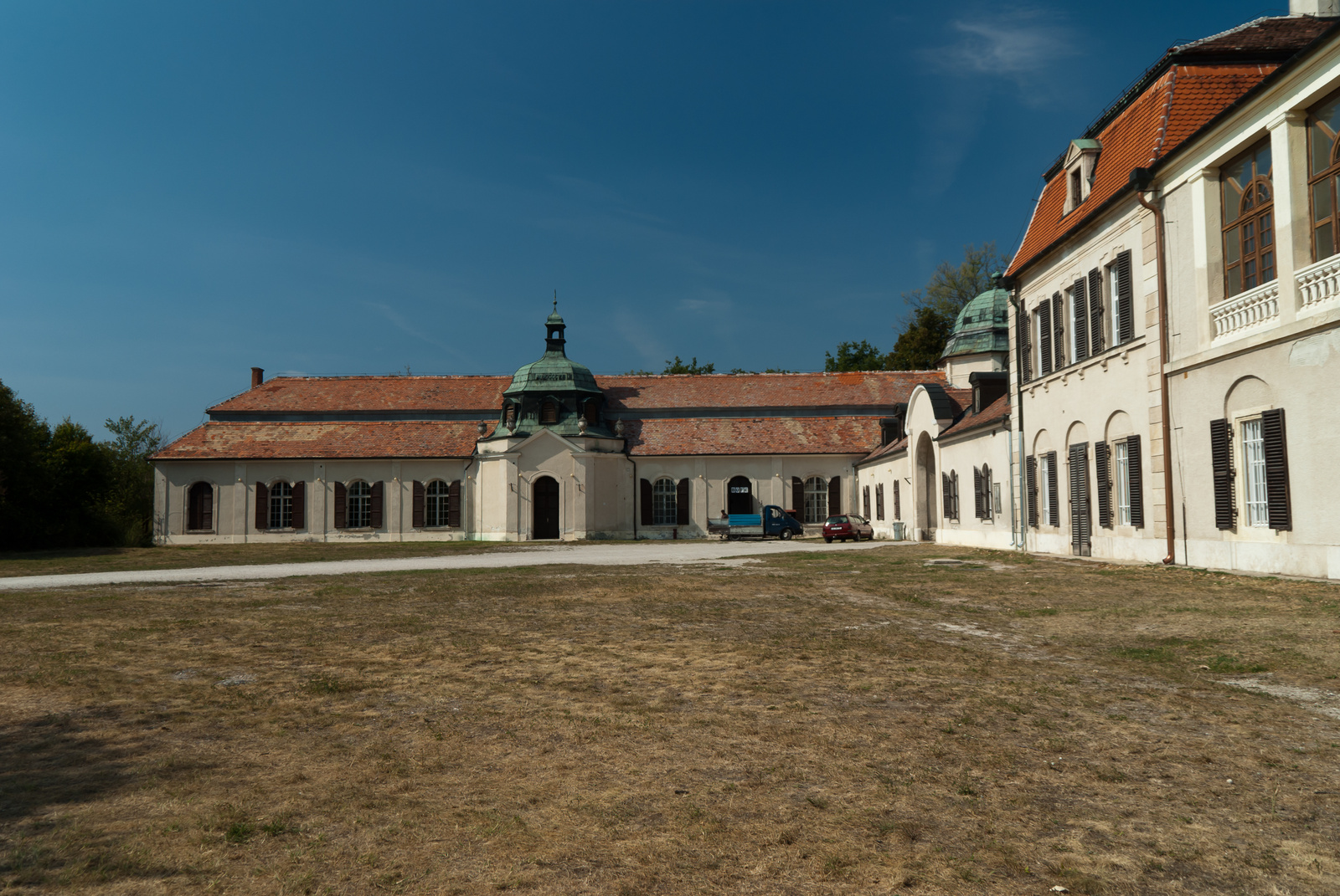 Amade-Bajzáth-Pappenheim-Károlyi-kastély (Iszkaszentgyörgy, Rákóczi utca 1.) This is a photo of a monument in Hungary. Identifier: 3658